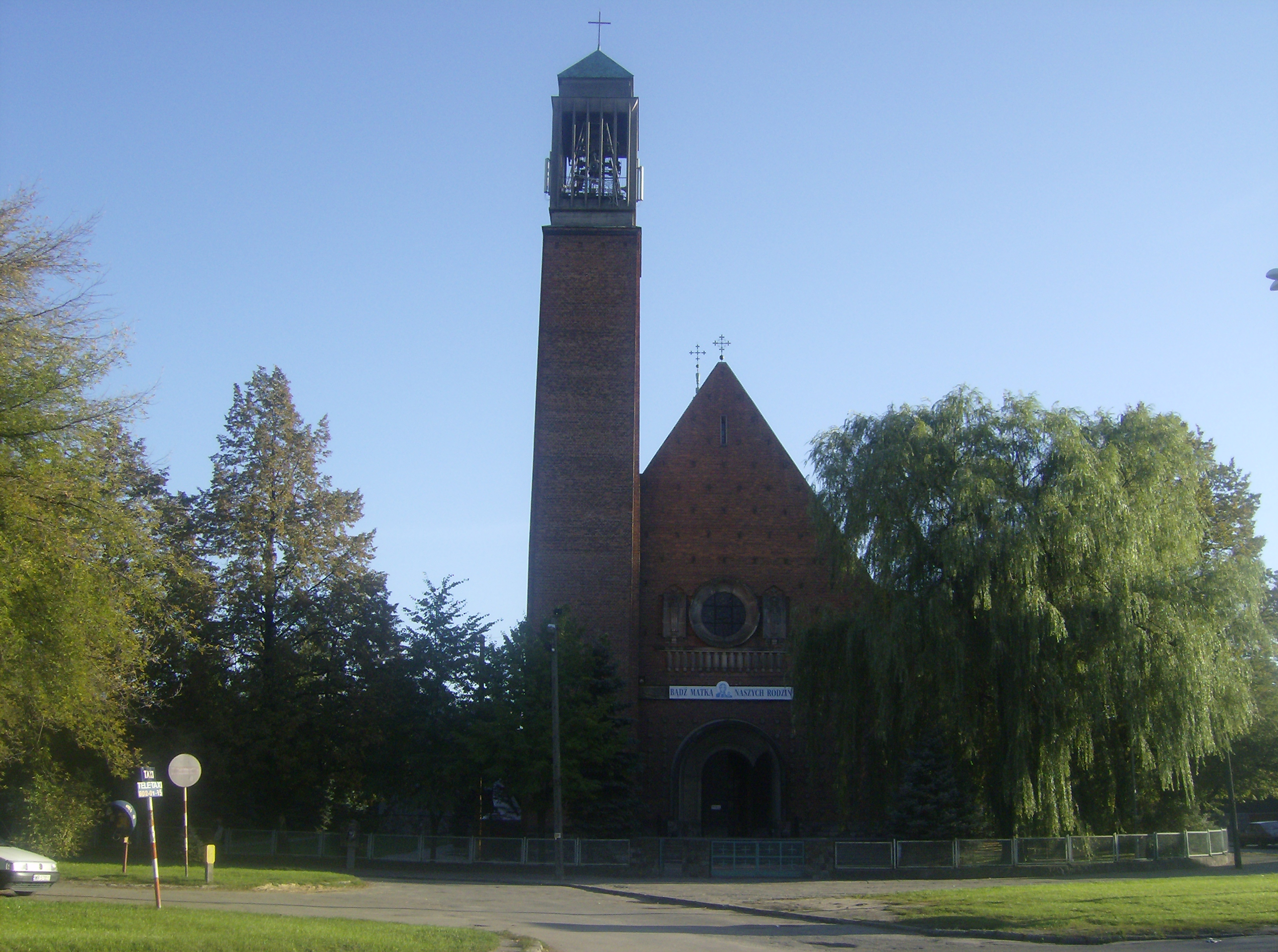 Kościół Świętej Teresy od Dzieciątka Jezus w Radomiu